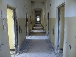 Gefängnis Rummelsburg Innenansicht Sanierung